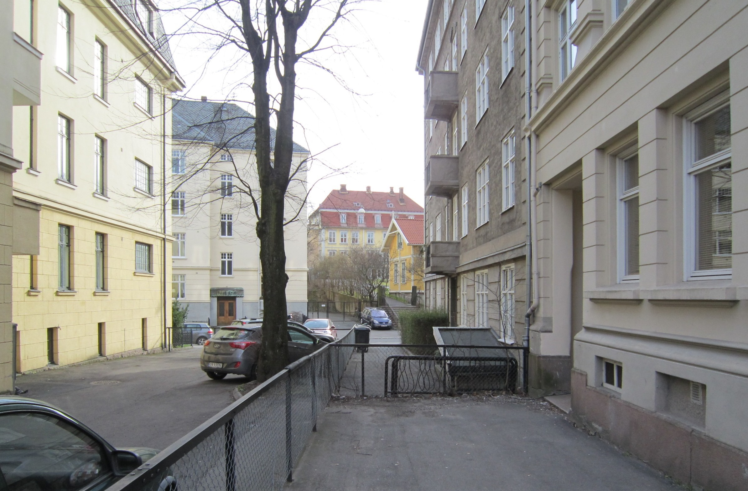 Schaftegata på Frogner i Oslo. Gatenavnet er offisielt gått ut av bruk.